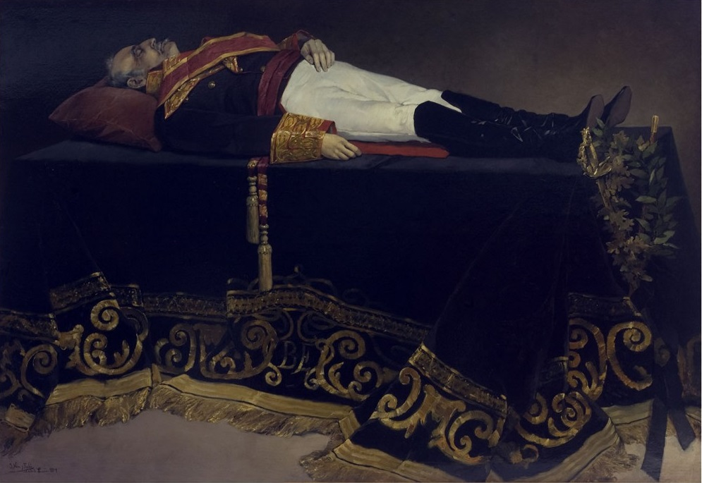 La obra muestra el cadaver del general y politico español Baldomero Espartero (1793-1879), que fue príncipe de Vergara y regente de España y falleció en la ciudad de Logroño el día 8 de enero de 1879, siendo enterrado en la catedral de Logroño.